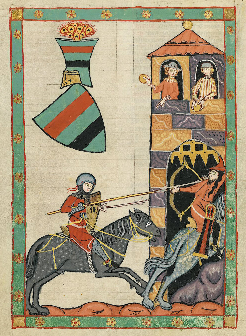 Codex Manesse, UB Heidelberg, Cod. Pal. germ. 848, fol. 226v, Kristan von Luppin, eine Thüring